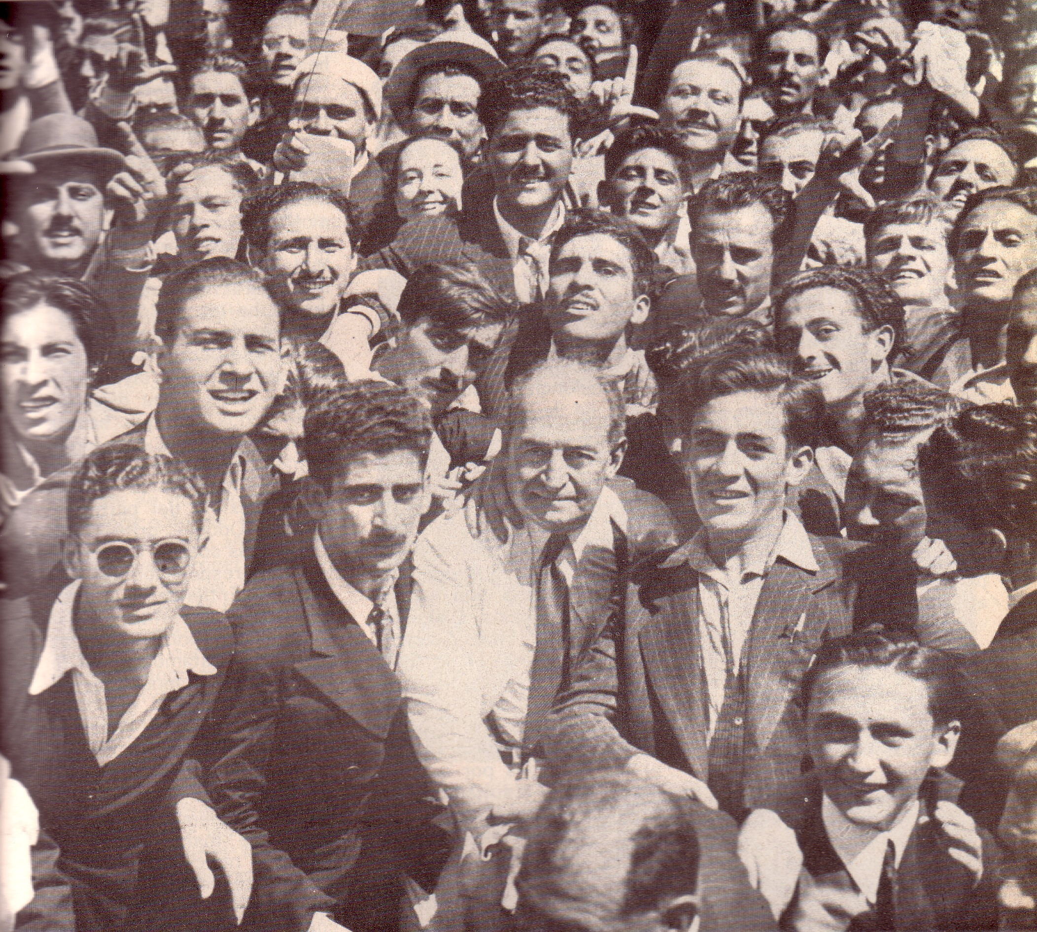 Enrique Mosca recibido en Retiro por jovenes radicales, 1946.